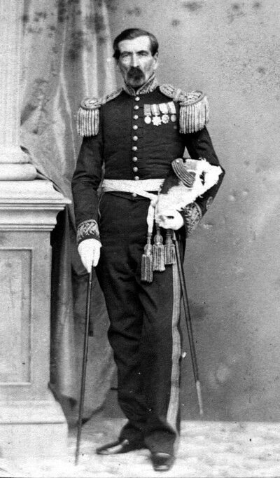 Marcos Maturana del Campo; militar y político chileno. Nació en San Fernando el año 1802. Murió en Santiago el 29 de agosto de 1871. Hijo de don Manuel Jesús Maturana Guzmán y de doña Petronila del Campo. Se casó con Francisca Molina Berbén y en segundo matrimonio, con Trinidad Palazuelos Astaburuaga, el 9 de abril de 1840, con la cual tuvo descendencia.